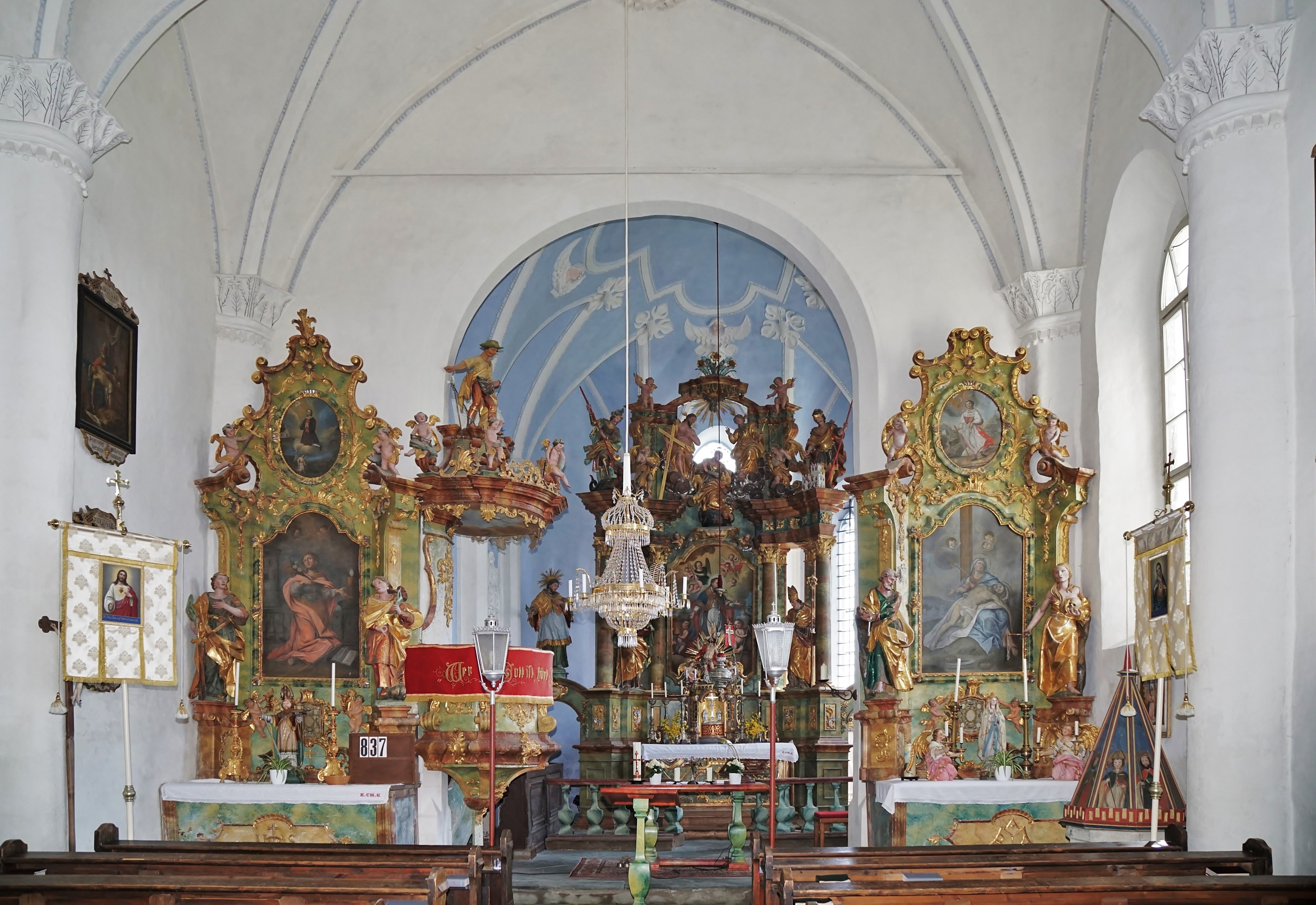 Kath. Pfarrkirche Hll. Rupert und Virgil, Außerteuchen (Himmelberg, Kärnten), Innenansicht